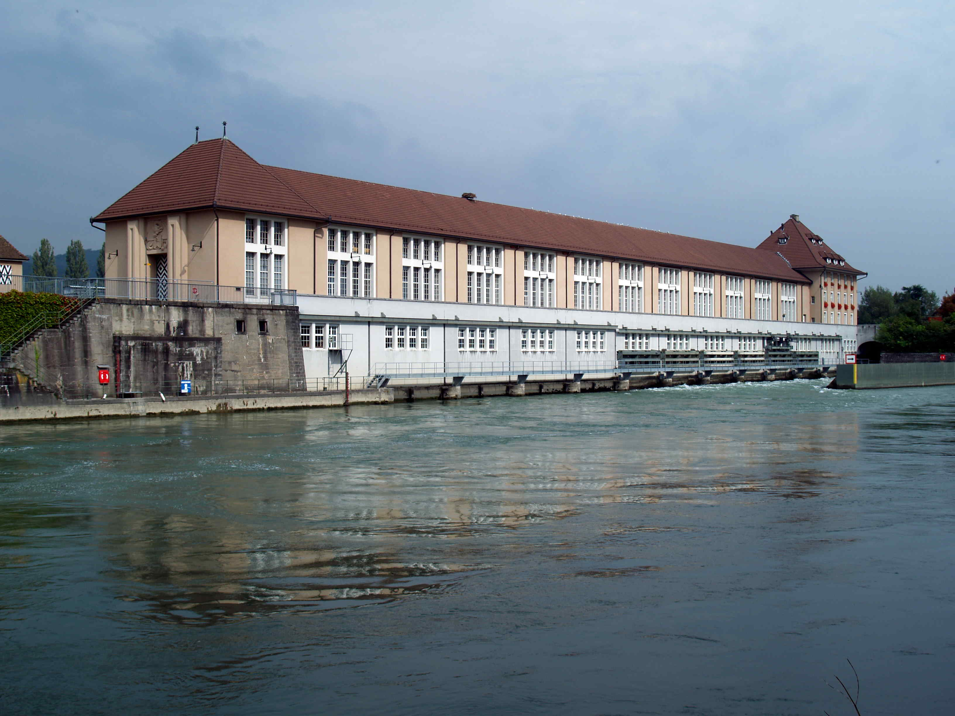 Die Maschinenhalle des Kraftwerks Augst